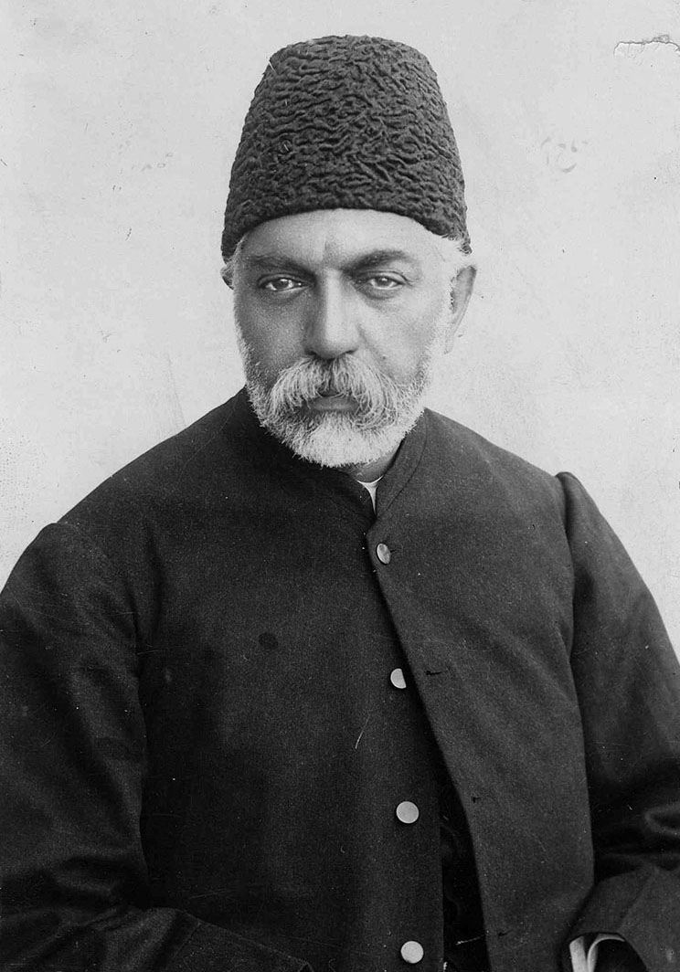 علی امین‌الدوله؛ صدراعظم قاجاریان